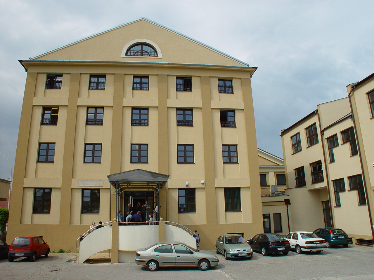 Budynek Collegium Novum Wyższej Szkoły Zarządzania i Administracji w Zamościu, ul. Sienkiewicza 22a, 22-400 Zamość